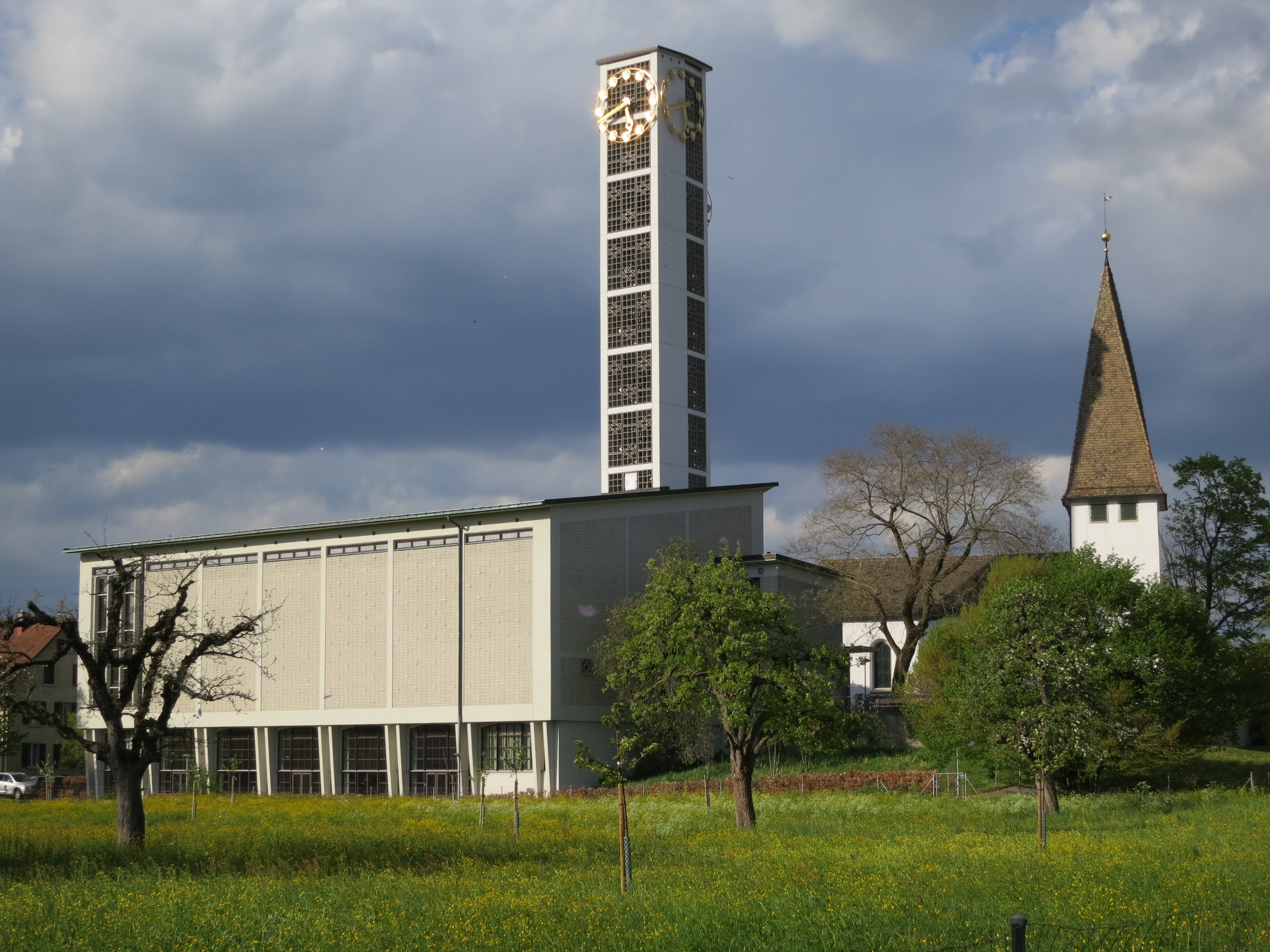 Reformierte Kirchen, Zürich-Altstetten, Schweiz